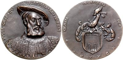 Wolfgang I. Graf von Montfort- Rothenfels Bronzegußmedaille 1530, 129,67 g, 61 mm